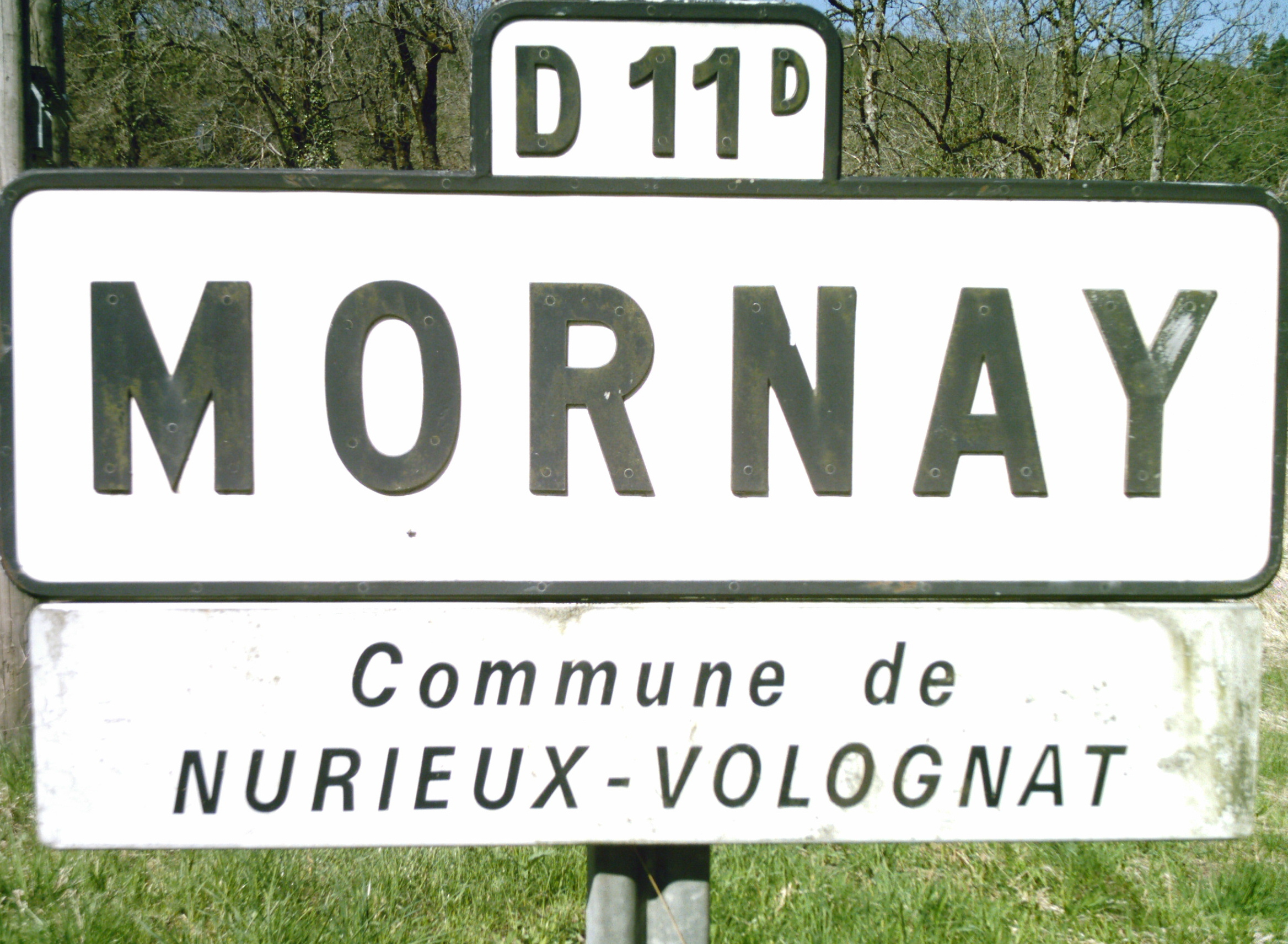 Panneau d'entrée d'agglomération de Mornay